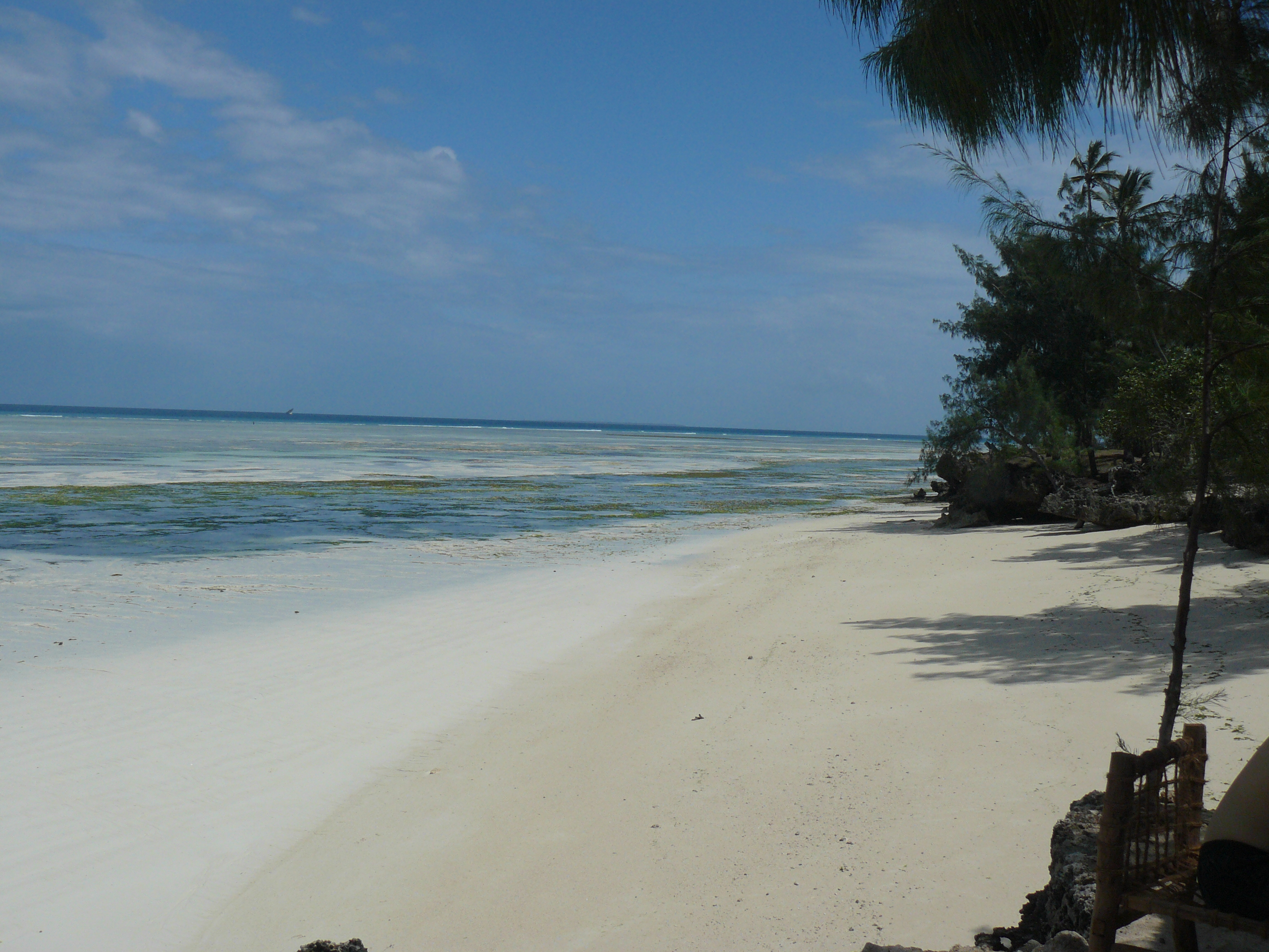 Zanzibar Beach